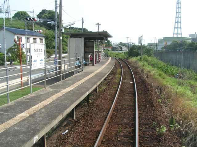 棚方駅 投稿者が撮影(2006/08/28)